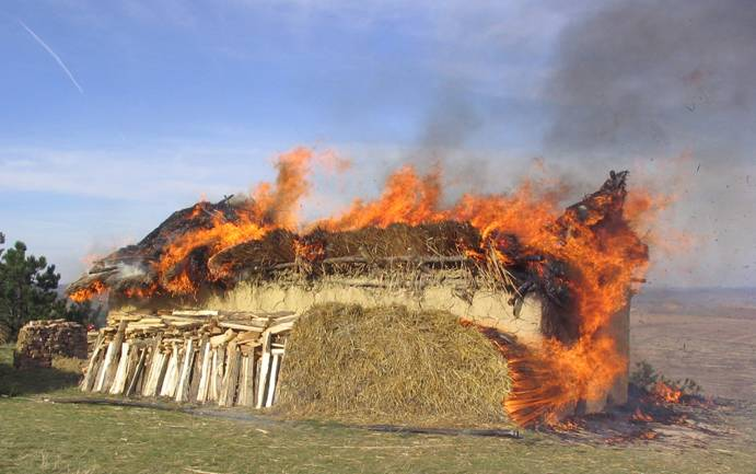 Laboratorul de Arheologie Aplicata - Arheologie experimentala.